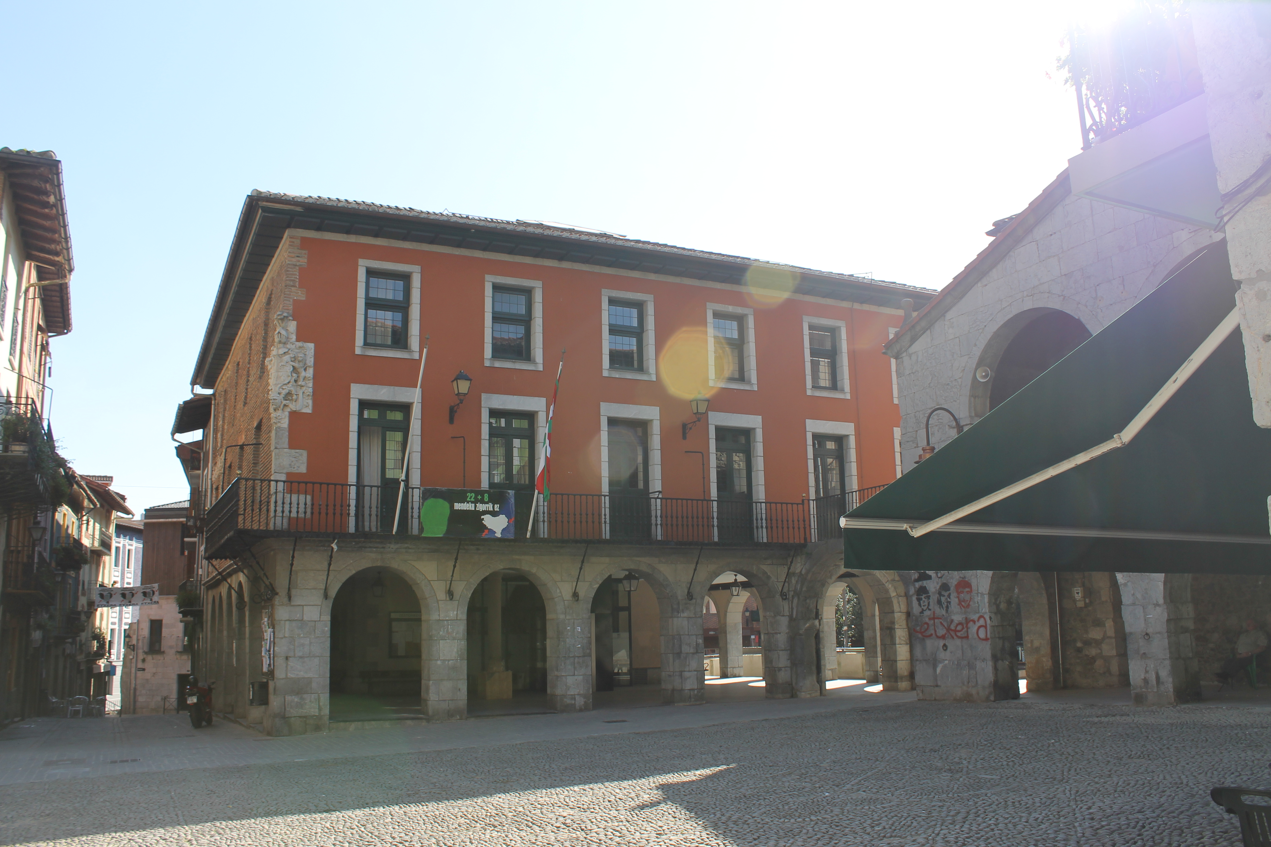 Clasica Casa Consistorial de un pueblo pequeño vasco. soportales con arcos para cobigarse y atar los caballos/carros.